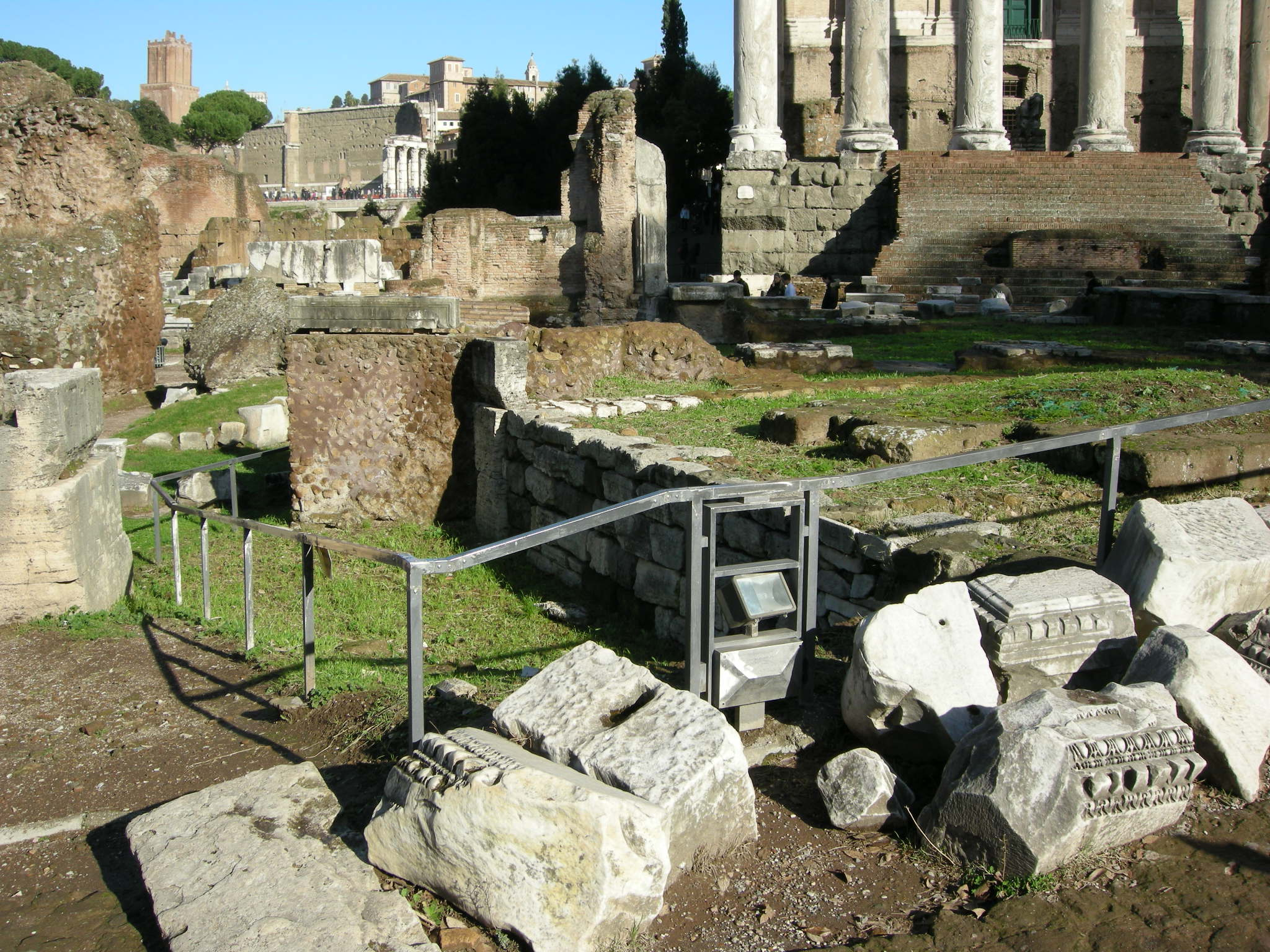 Regia